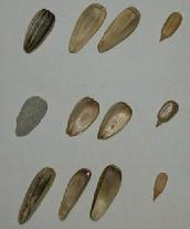 Foto van zonnebloempitten, zelf gemaakt voor illustratie v. nieuw artikel over de zonnebloempit. GNU-FDL.